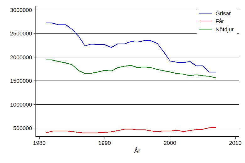 Antalet djur ägda av lantbrukare av olika sorter från 1981 till 2007.